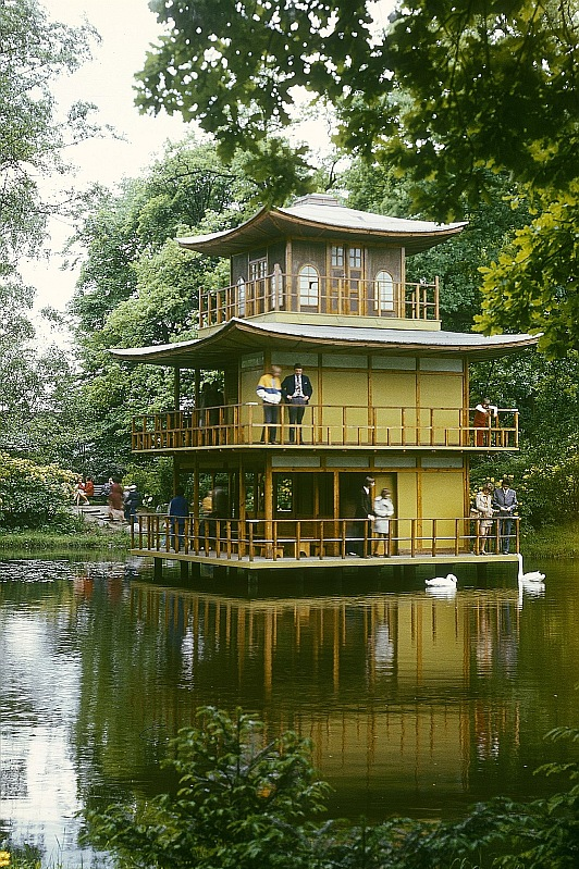 Original image description from the Deutsche Fotothek Wroclaw. Historische Gärten, Teehaus im Japanischen Garten (Szczytnicki Park)